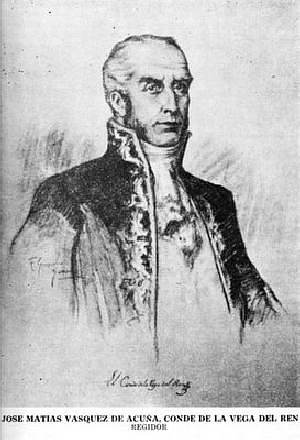 José Matías Pascual Cayetano Vásquez de Acuña Menacho y Ribera de Mendoza. VII Conde de la Vega del Ren, Señor de los Mayorazgos de Menacho y Morga, y caballero de la Orden de Santiago.